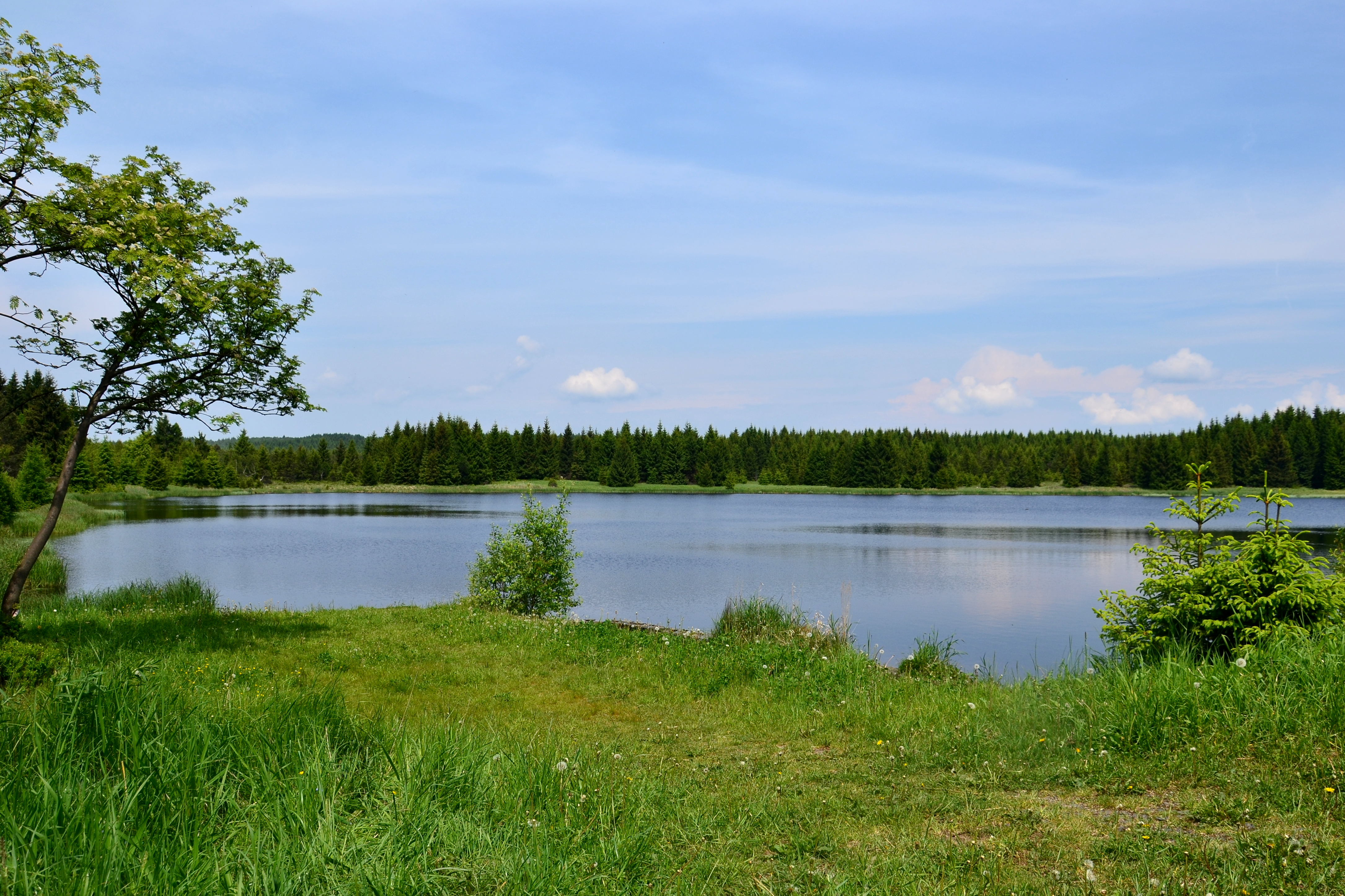 Novodomské rašeliniště – Starý rybník